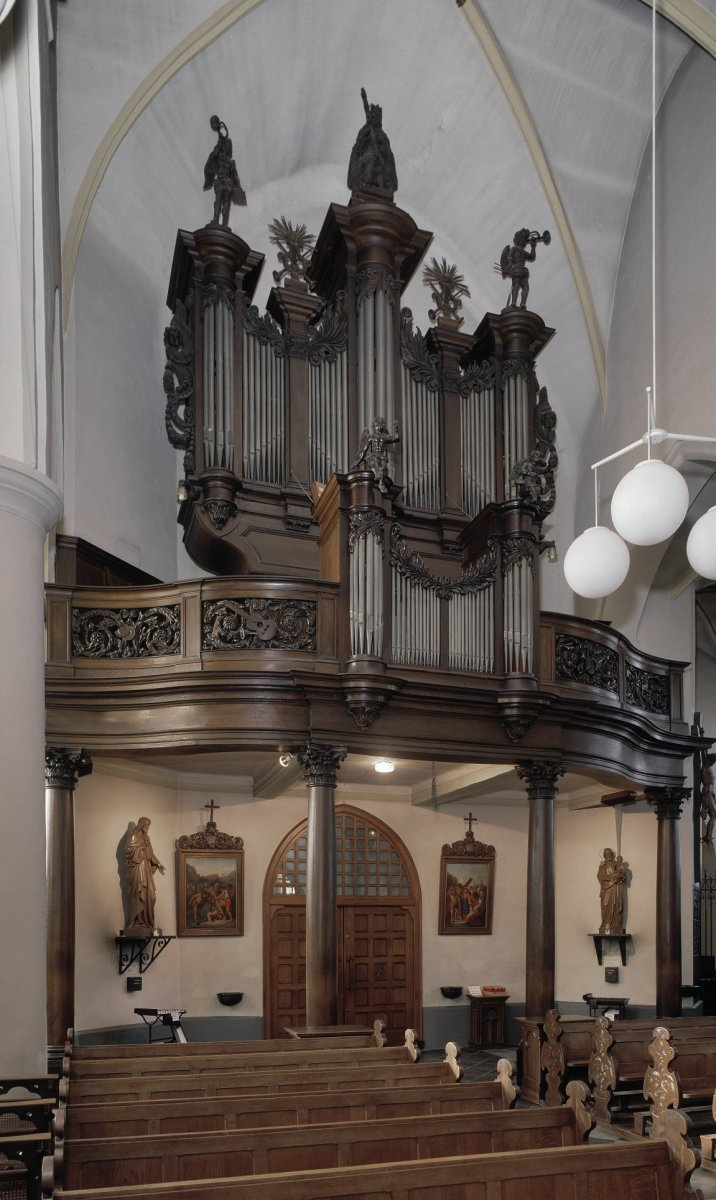 Sint Lambertuskerk: Interieur, aanzicht orgel, orgelnummer 1021 (opmerking: Gefotografeerd voor Het Historische Orgel in Nederland 1850-1858)